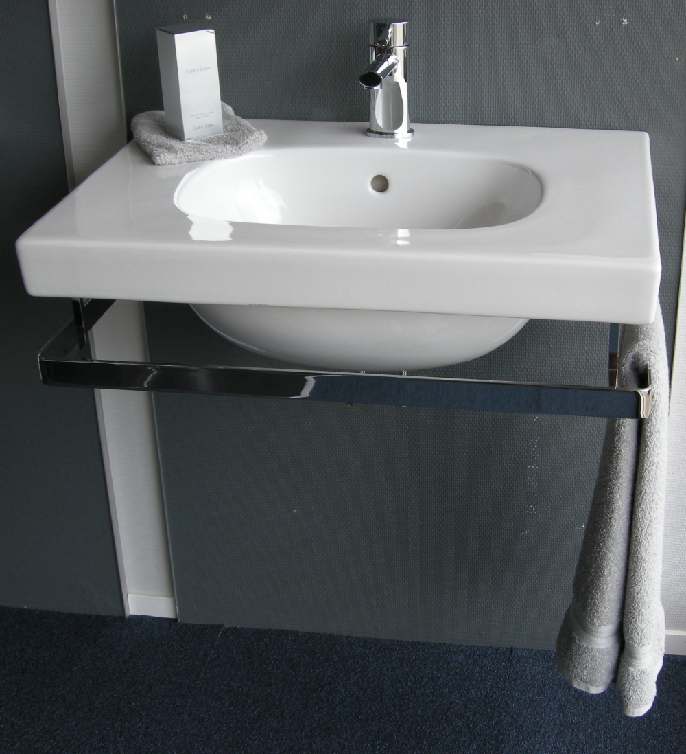 Een moderne porceleinen wastafel